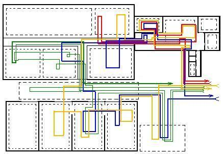 Diagram_spaghetti_kilka_produktow